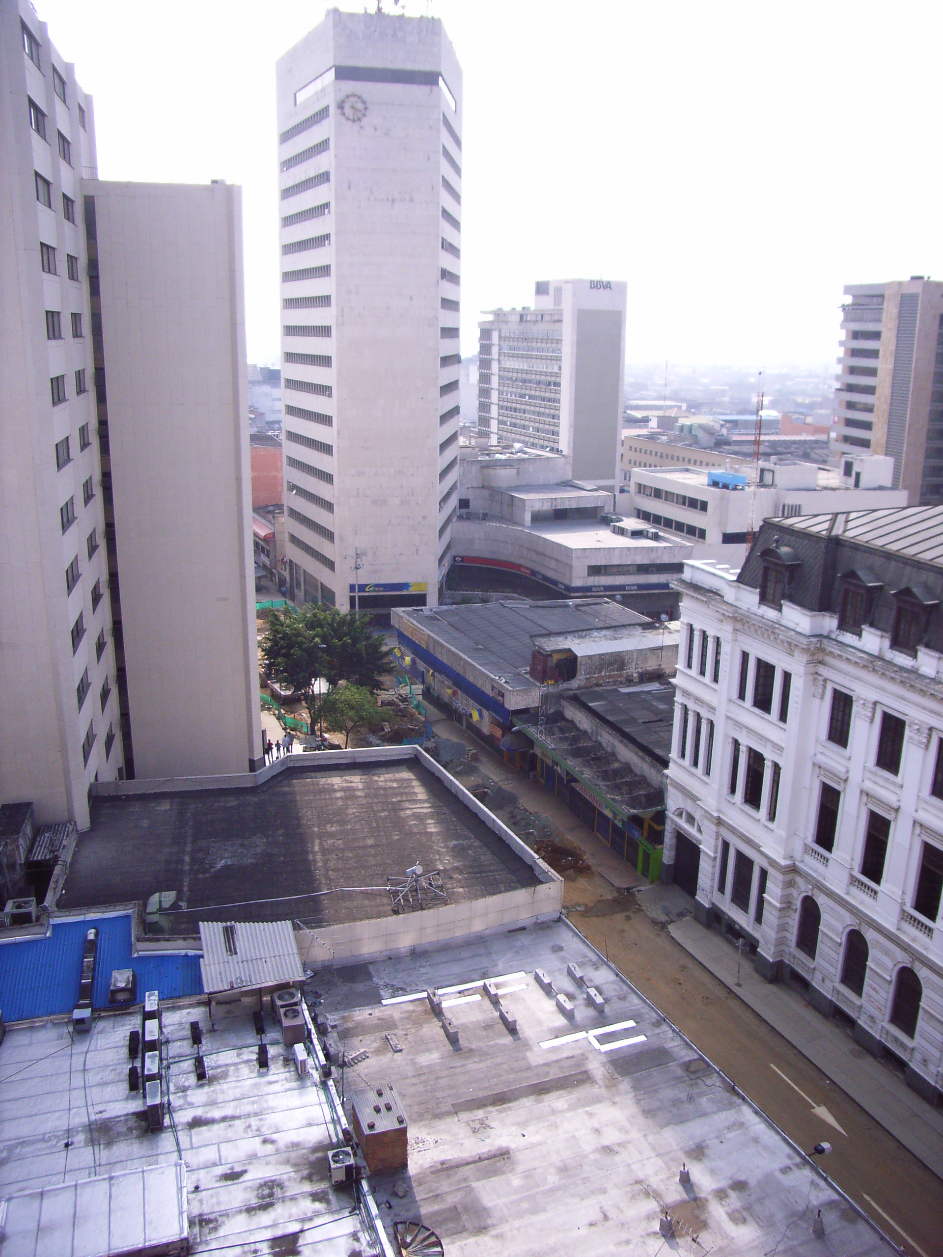 Edificio Cámara de Comercio de Cali, Cali, Colombia